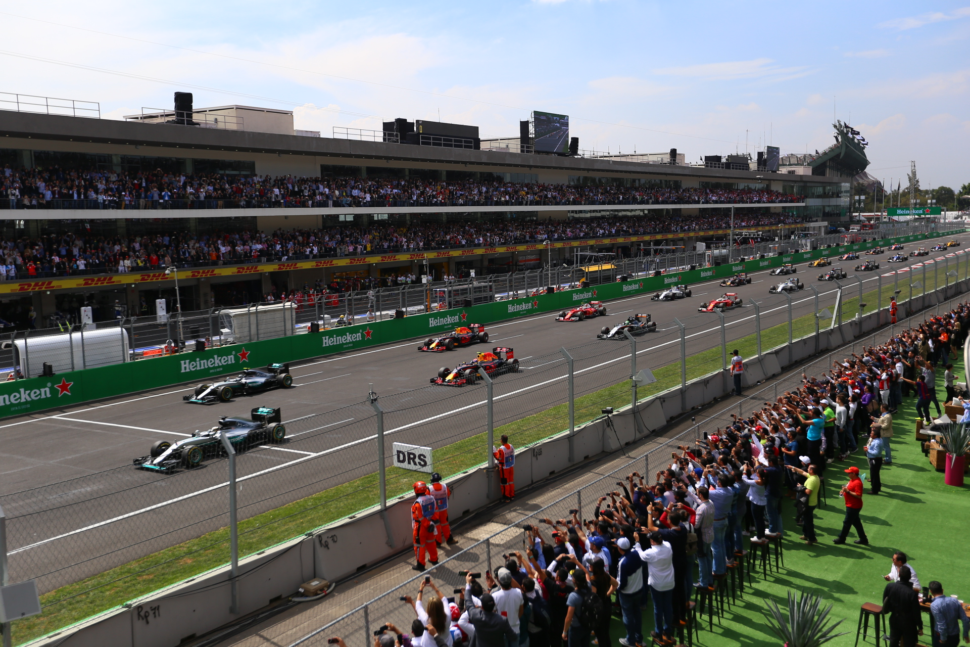 Formula 1 2016